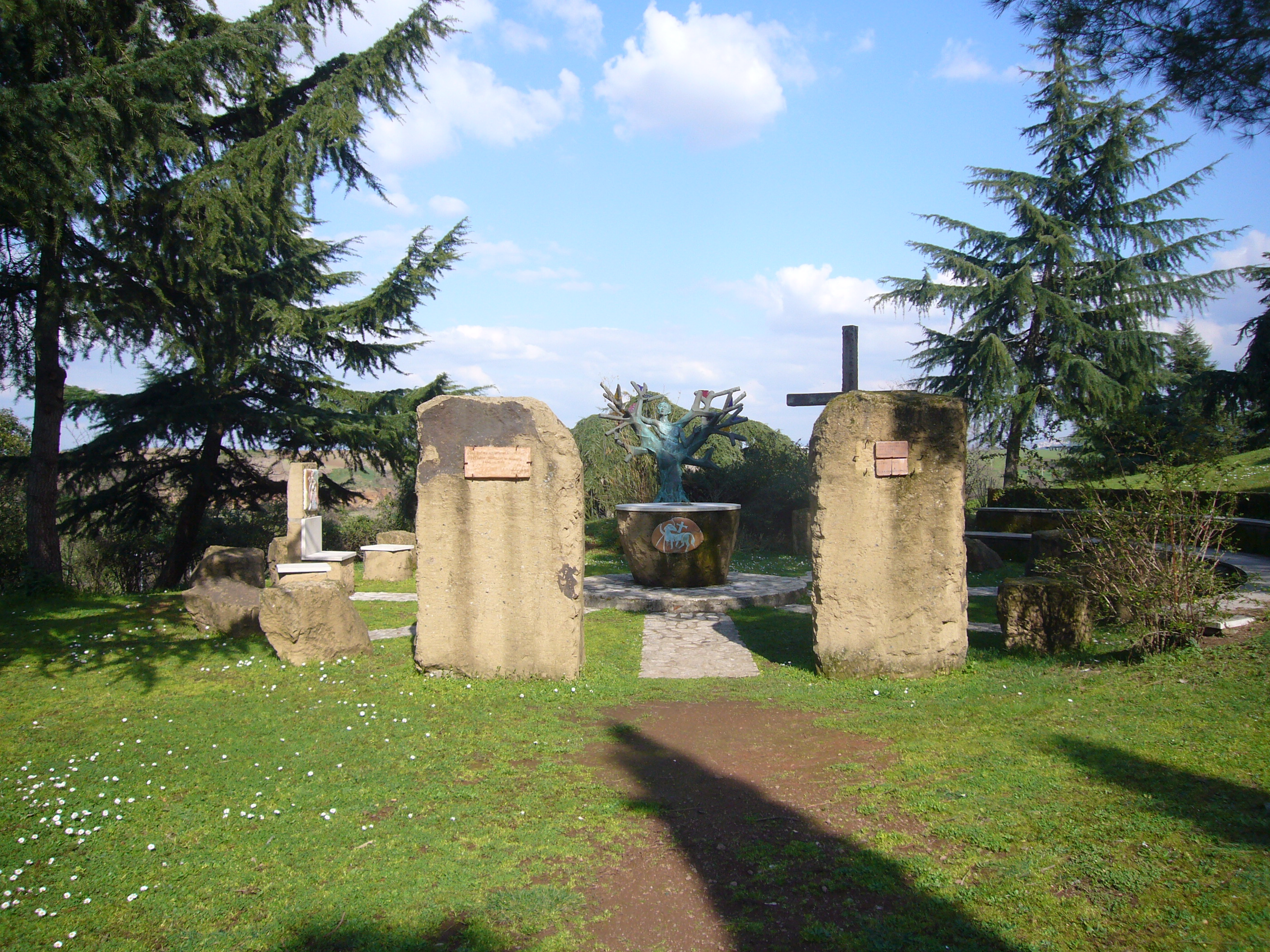 Roma, chiesa all'aperto degli zingari al santuario del Divino Amore, dedicata a Zeffirino Giménez Malla